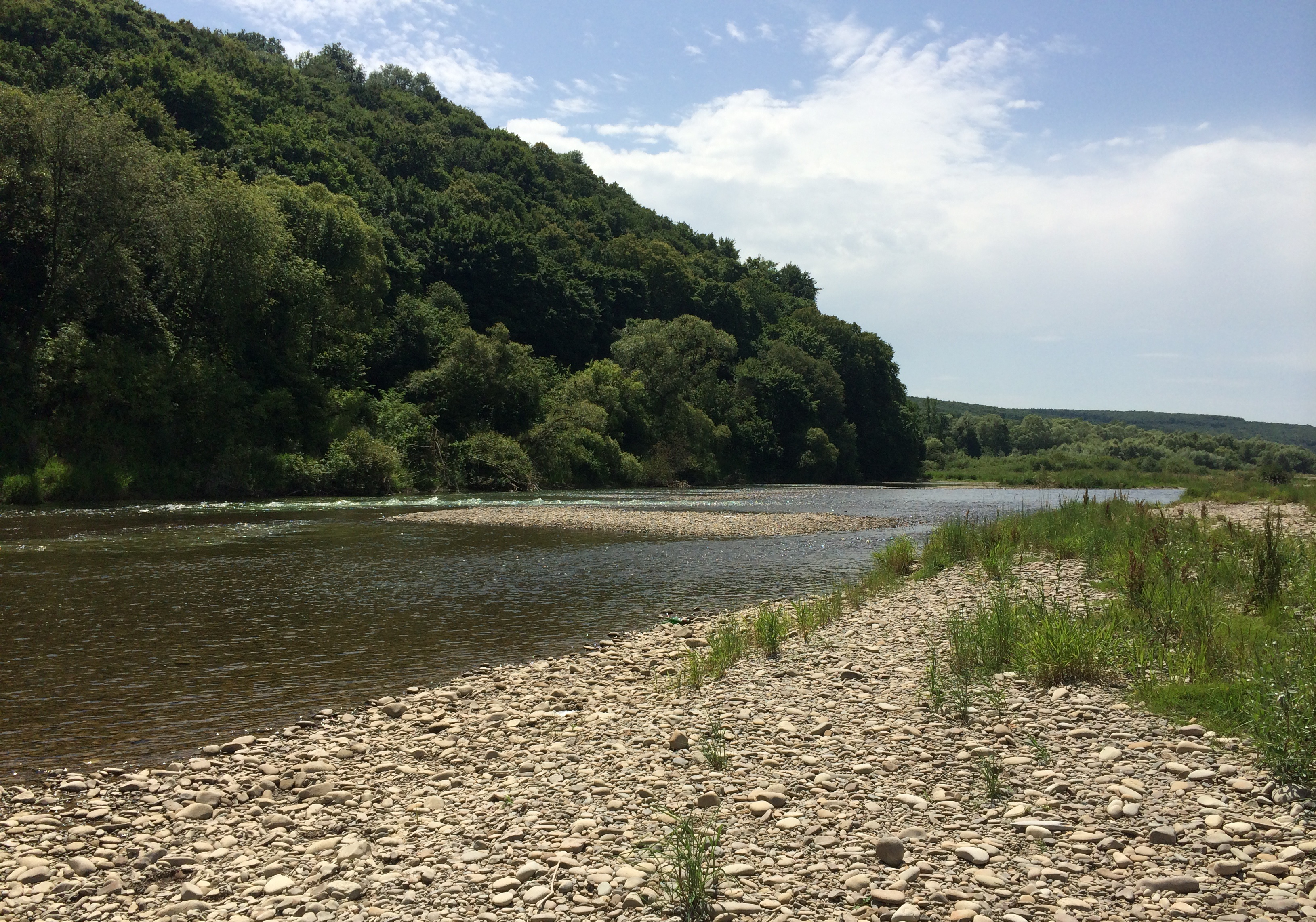 Галицький, Галицький район Ріка Лімниця, с. Блюдники